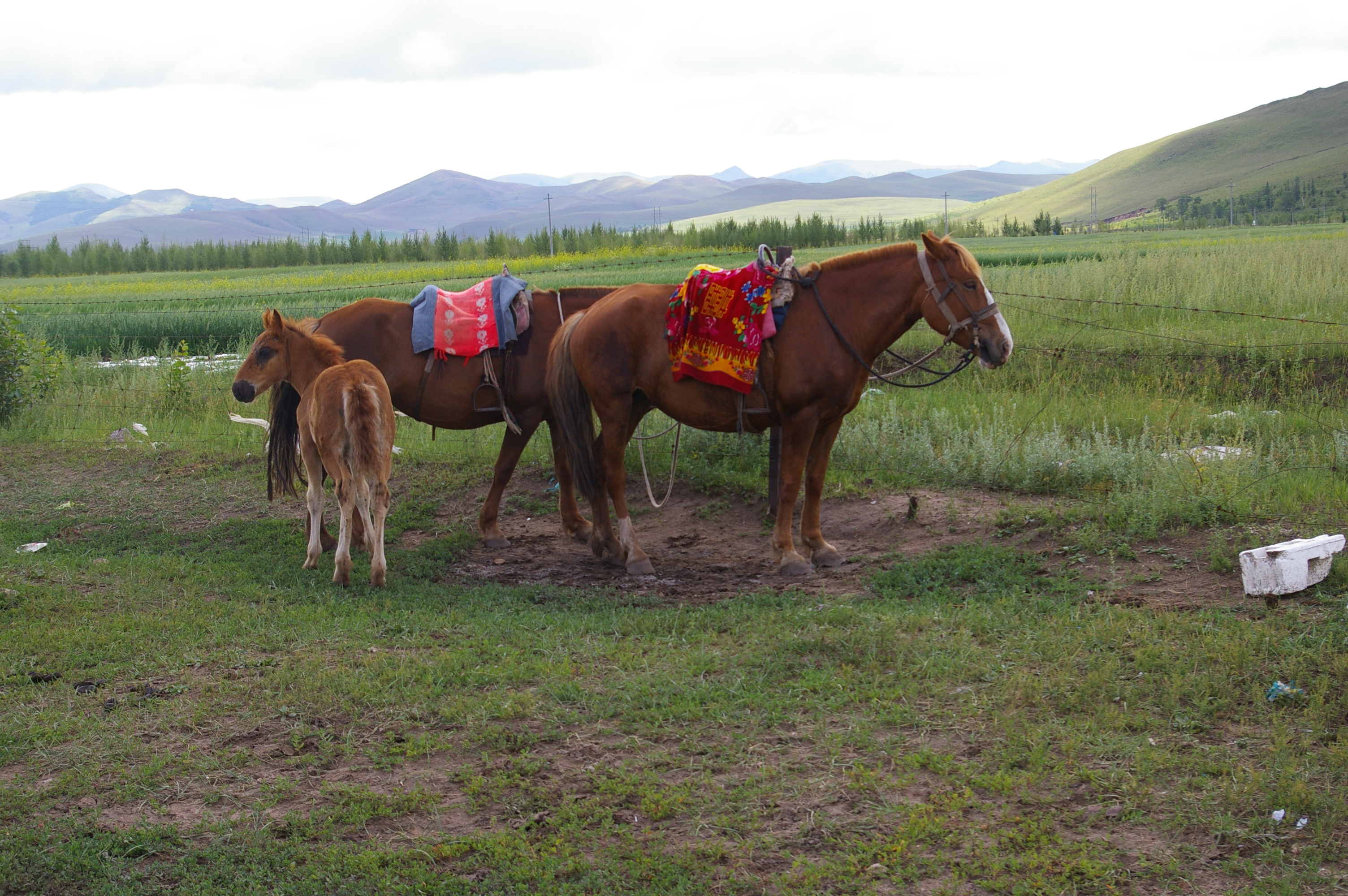 Horses riding in inner mongolia